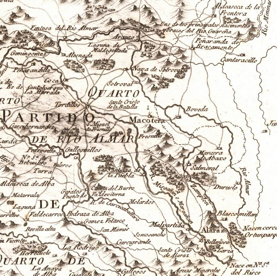 Fragmento del Mapa geográfico de la provincia de Salamanca elaborado por Tomás López en 1783. Corresponde aproximadamente al Quarto del Río Almar.